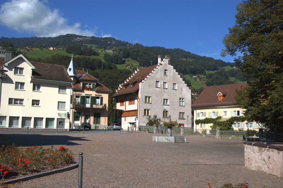 Flums Dorfplatz